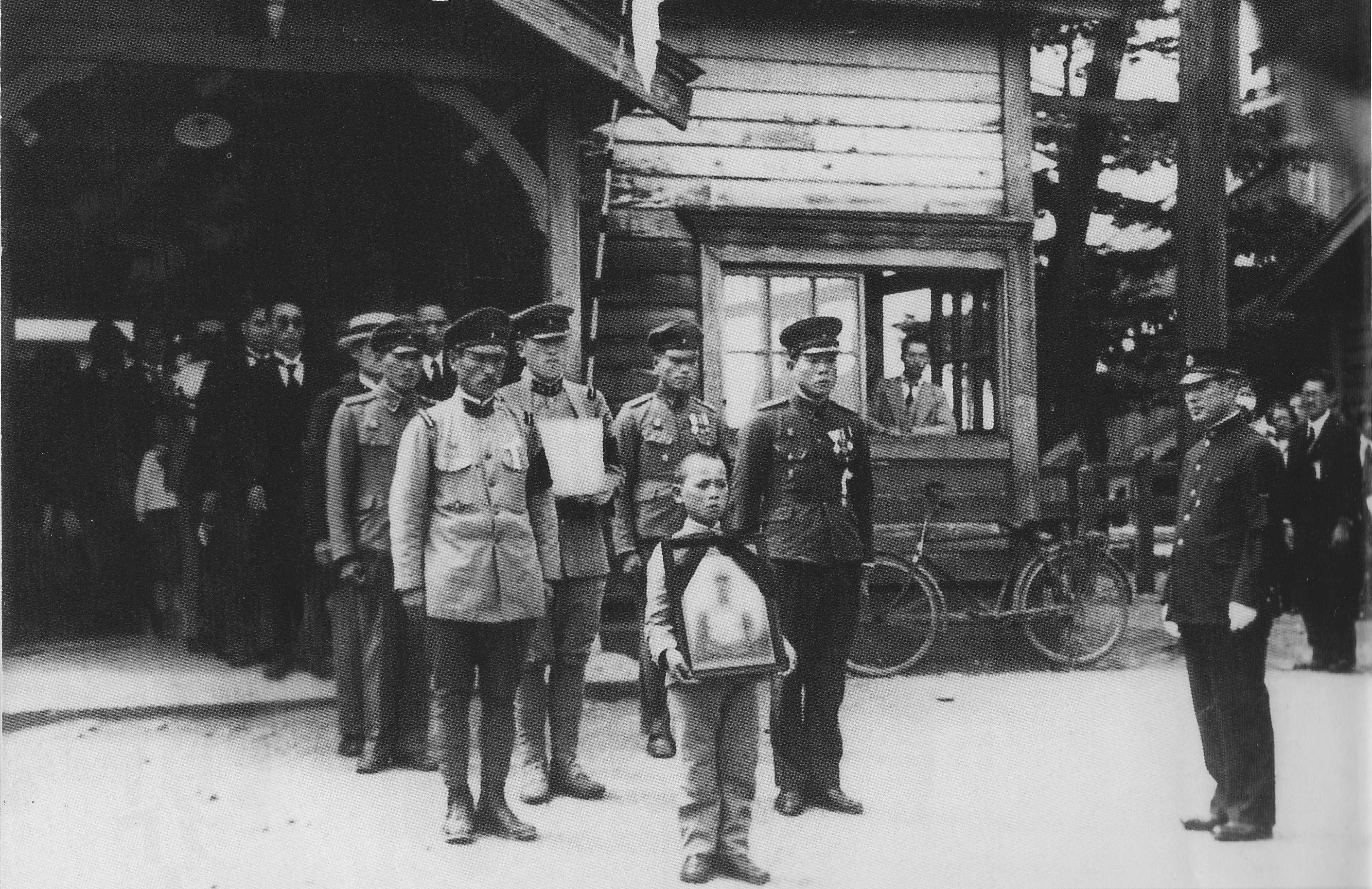 父親の遺影を抱き挨拶に立つ少年。北海道江部乙駅にて。